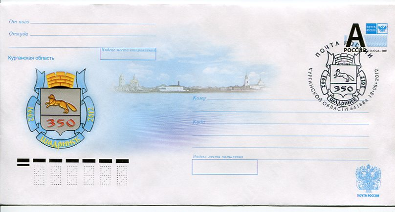 Шадринск 350 почтовый конверт Россия